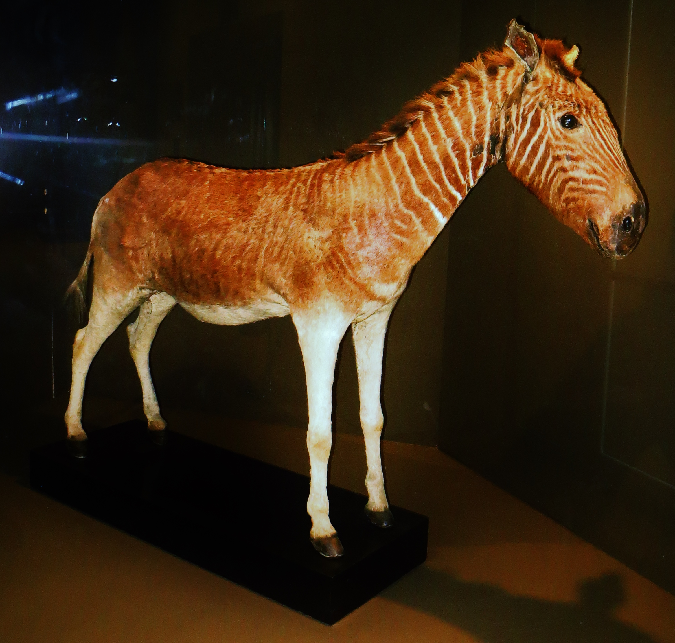 Quagga - Took the picture at MUSE, Trento